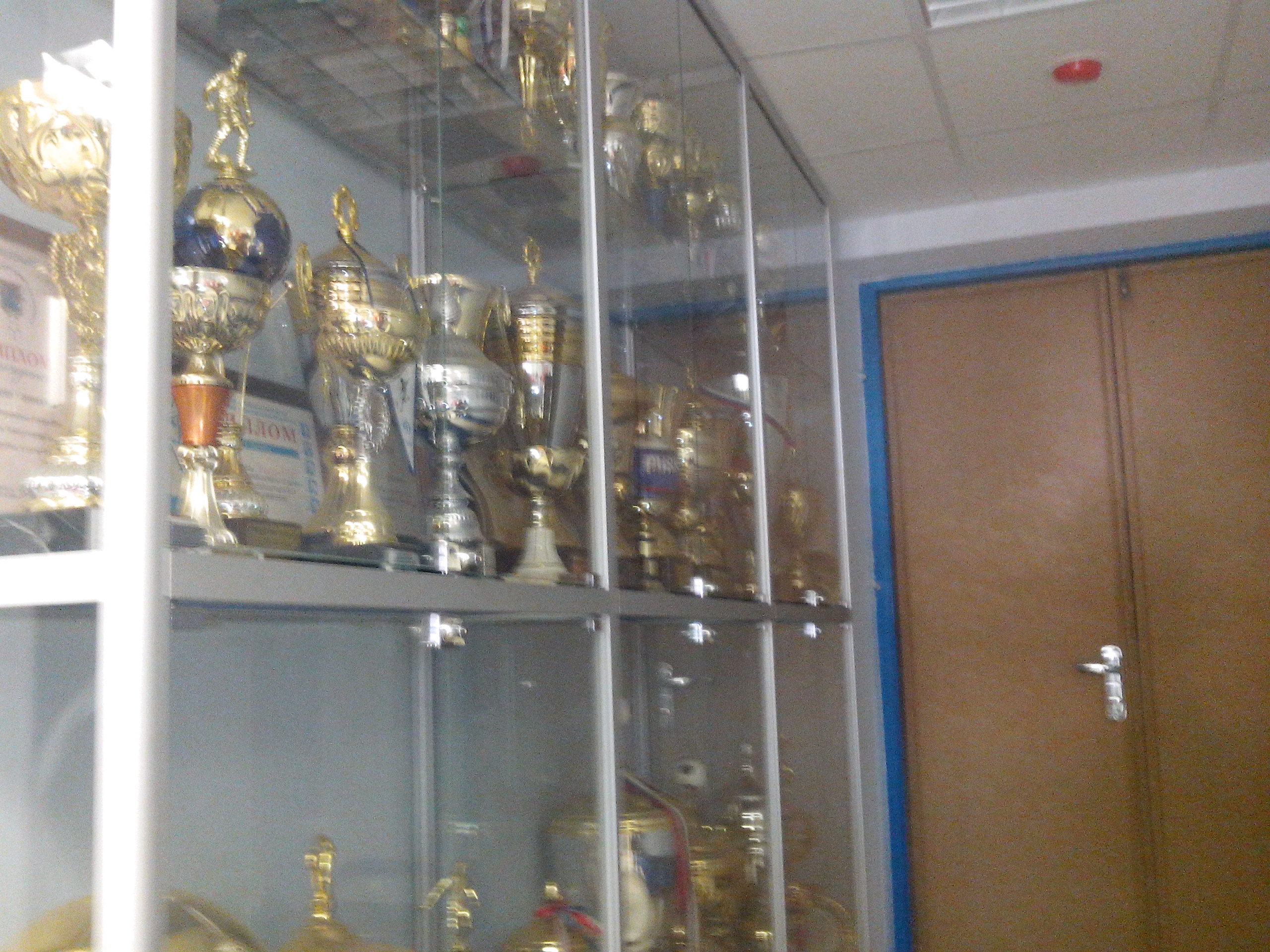 Трофеи Динамо СПБ